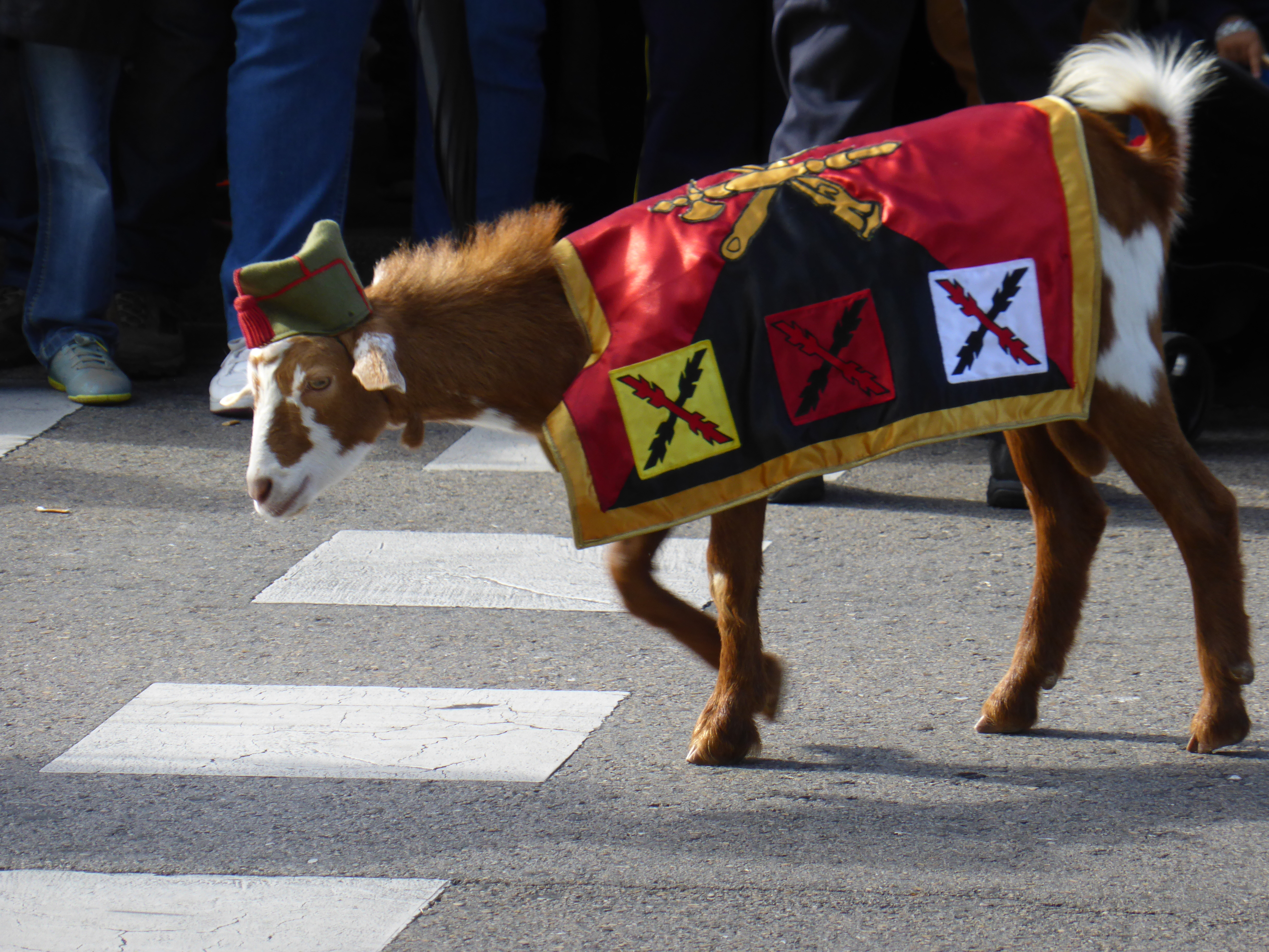 En el año 2015, la mascota del desfile legionario en Madrid, en la Fiesta Nacional de España, ha sido este ejemplar de cabra hembra (Capra aegagrus hircus, o cabra doméstica). Aquí aparece instantes antes de empezar el desfile, donde ha marchado suelta, a toda velocidad, al mismo paso que los legionarios.